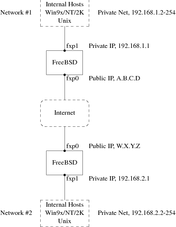 Монгол: Ipsec-network1